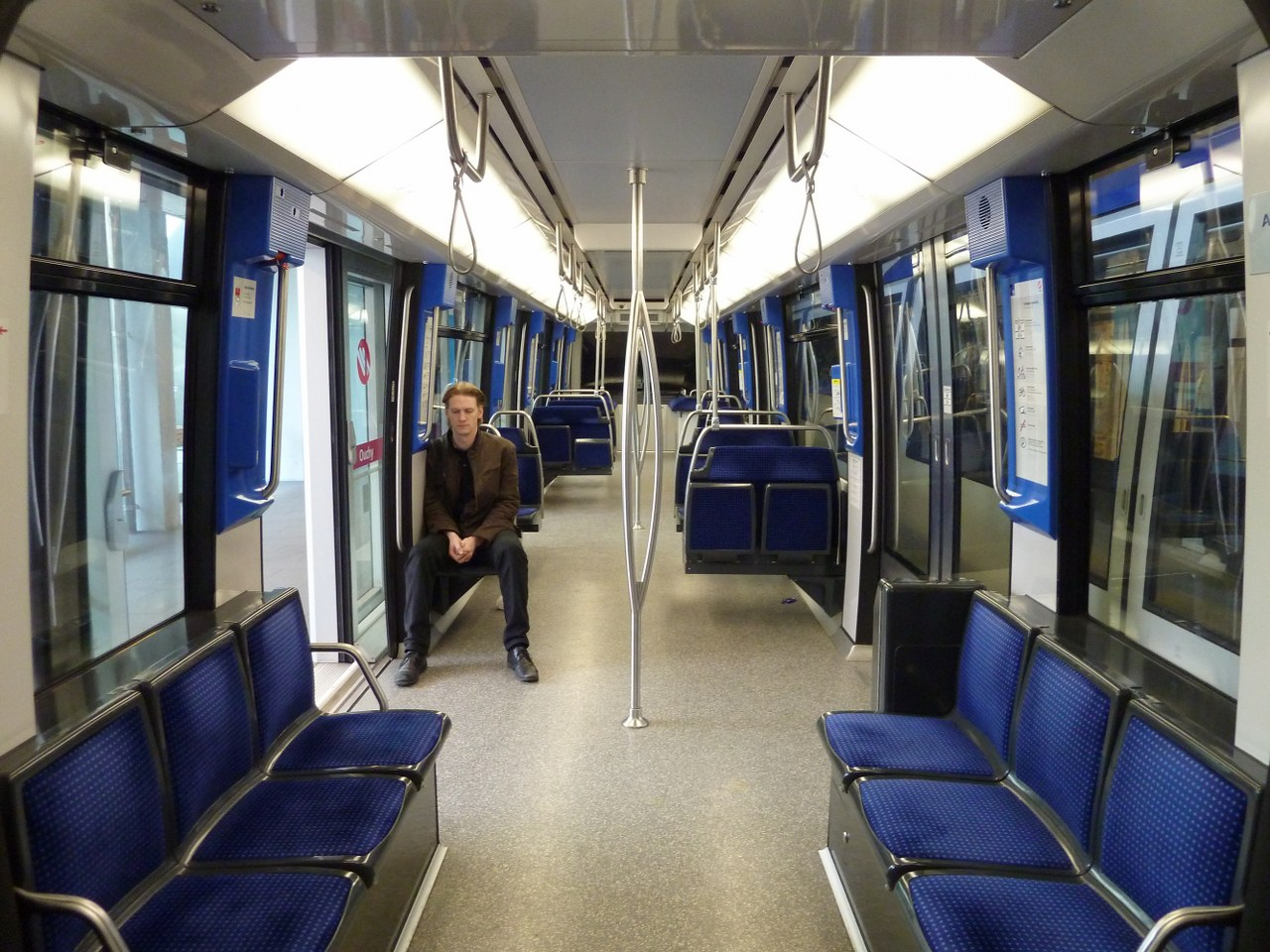 Interior de coche de la línea 2 del Métro de Lausanne